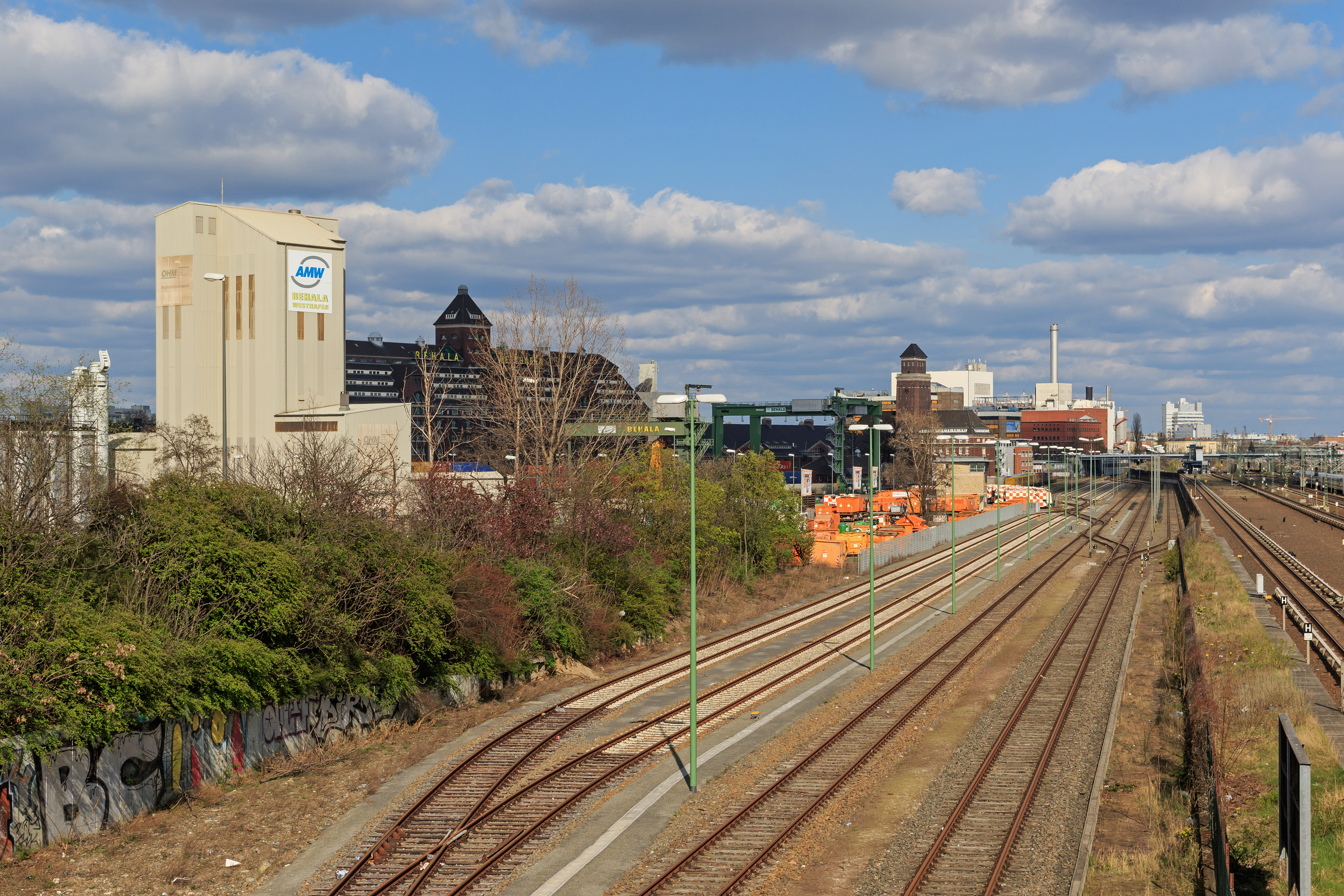 BEHALA Westhafen Berlin: Aussicht von der Beusselstraße